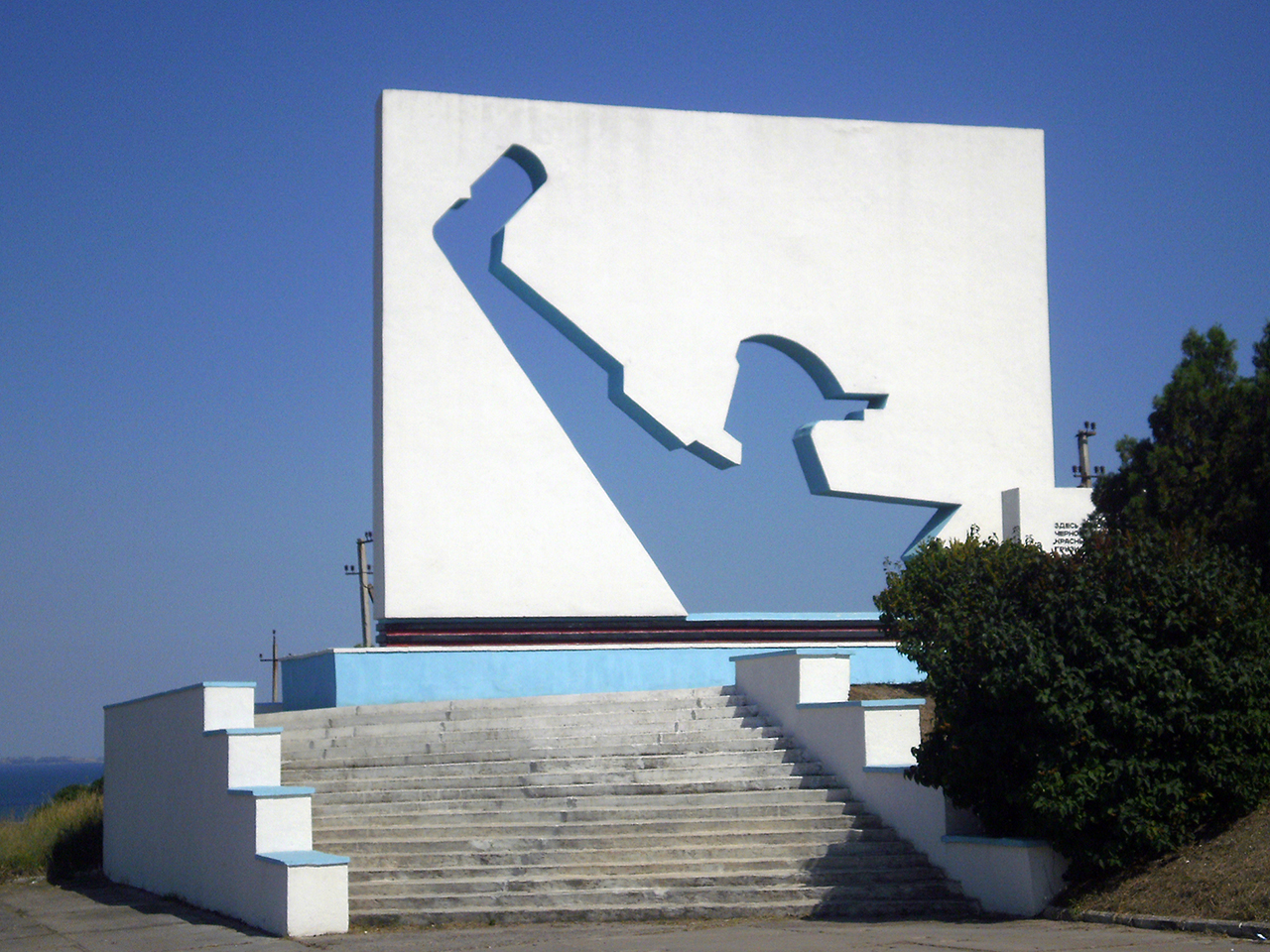 Монумент Григорівському десанту при в'їзді до села Григорівка, Комінтернівський район, Одеська область